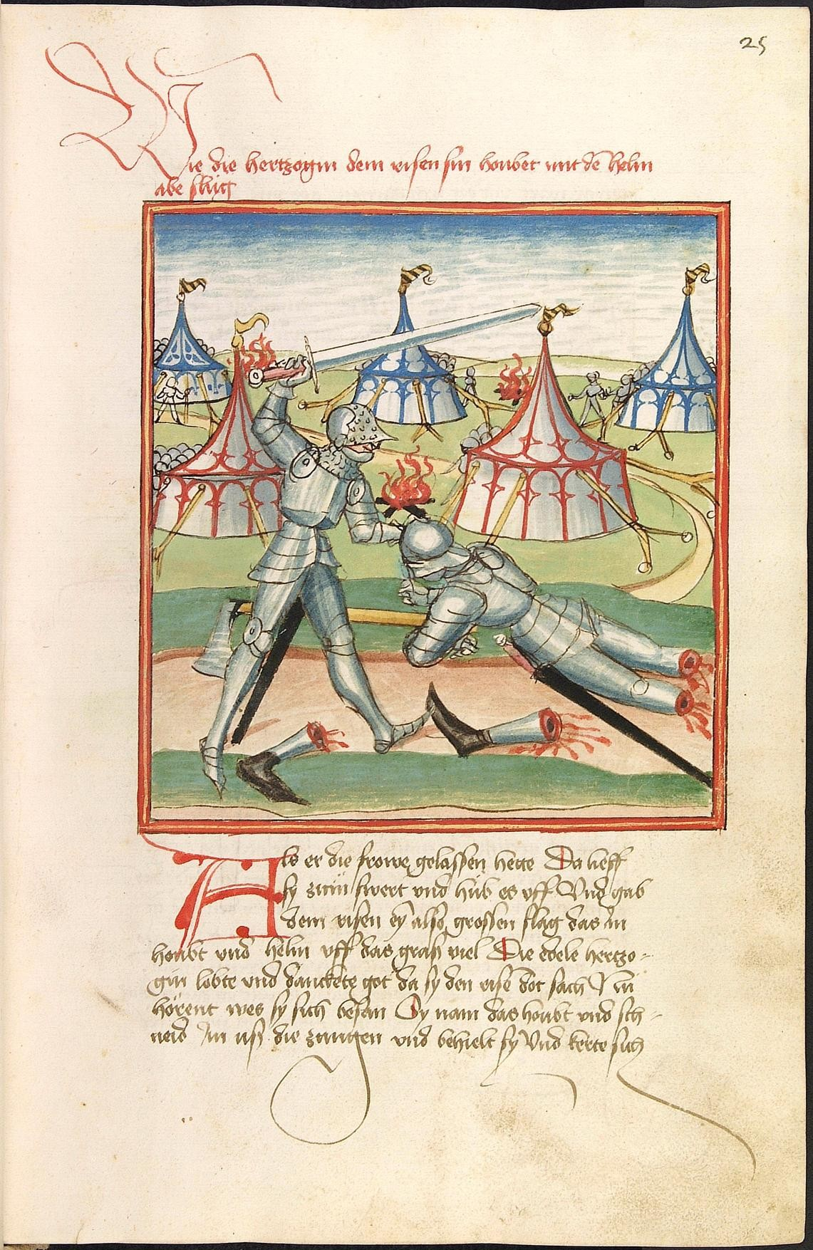 Codex Palatinus germanicus 152, Blatt 25r - Herpin - Die Herzogin (als Mann verkleidet) hat den Riesen besiegt und schlägt ihm den Kopf ab.